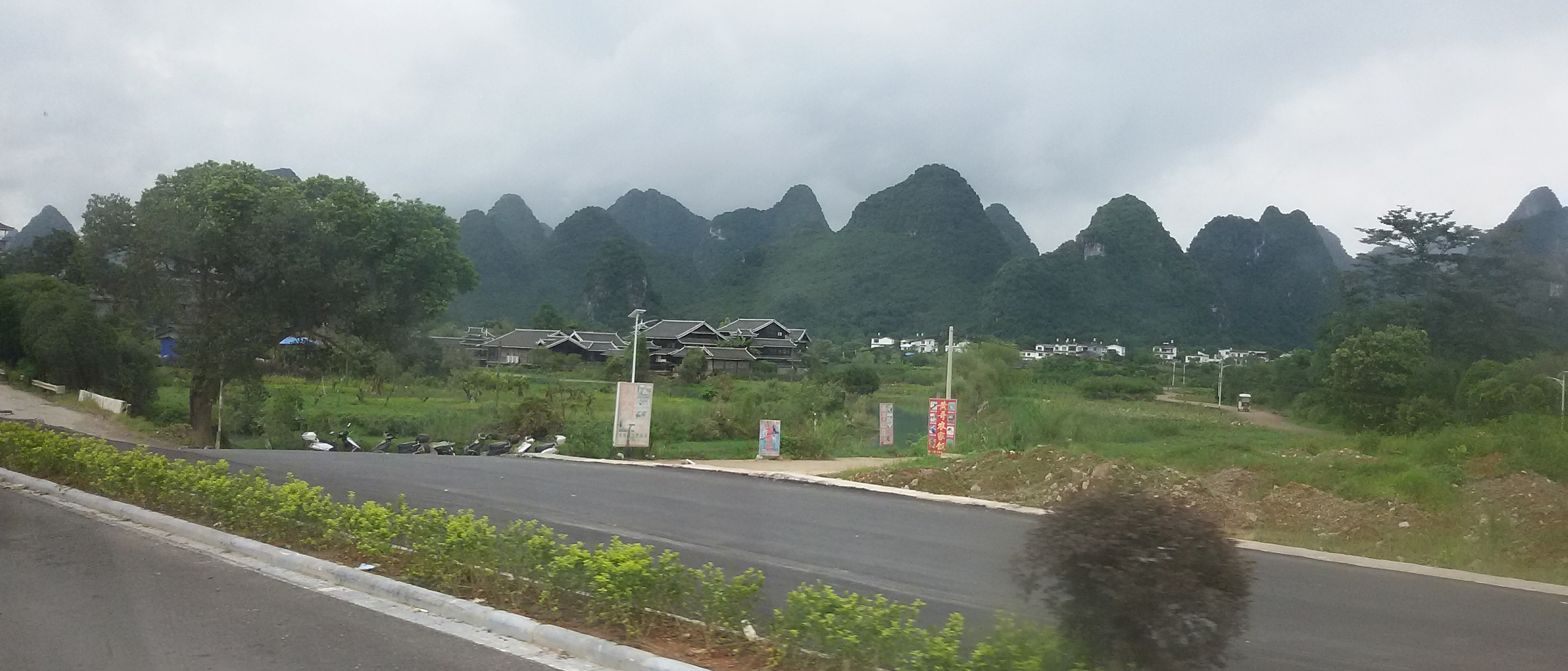 粵語: 喺321國道上面望去世外桃源嗰頭